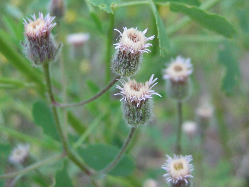 Scharfes Berufkraut Erigeron acris subsp. acris